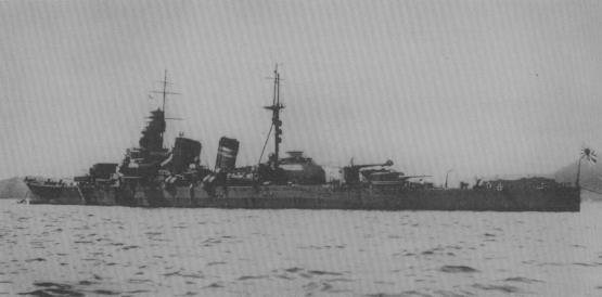 Тяжёлый крейсер «Кинугаса» в Курэ перед началом реконструкции. Вторая половина 1936 года.